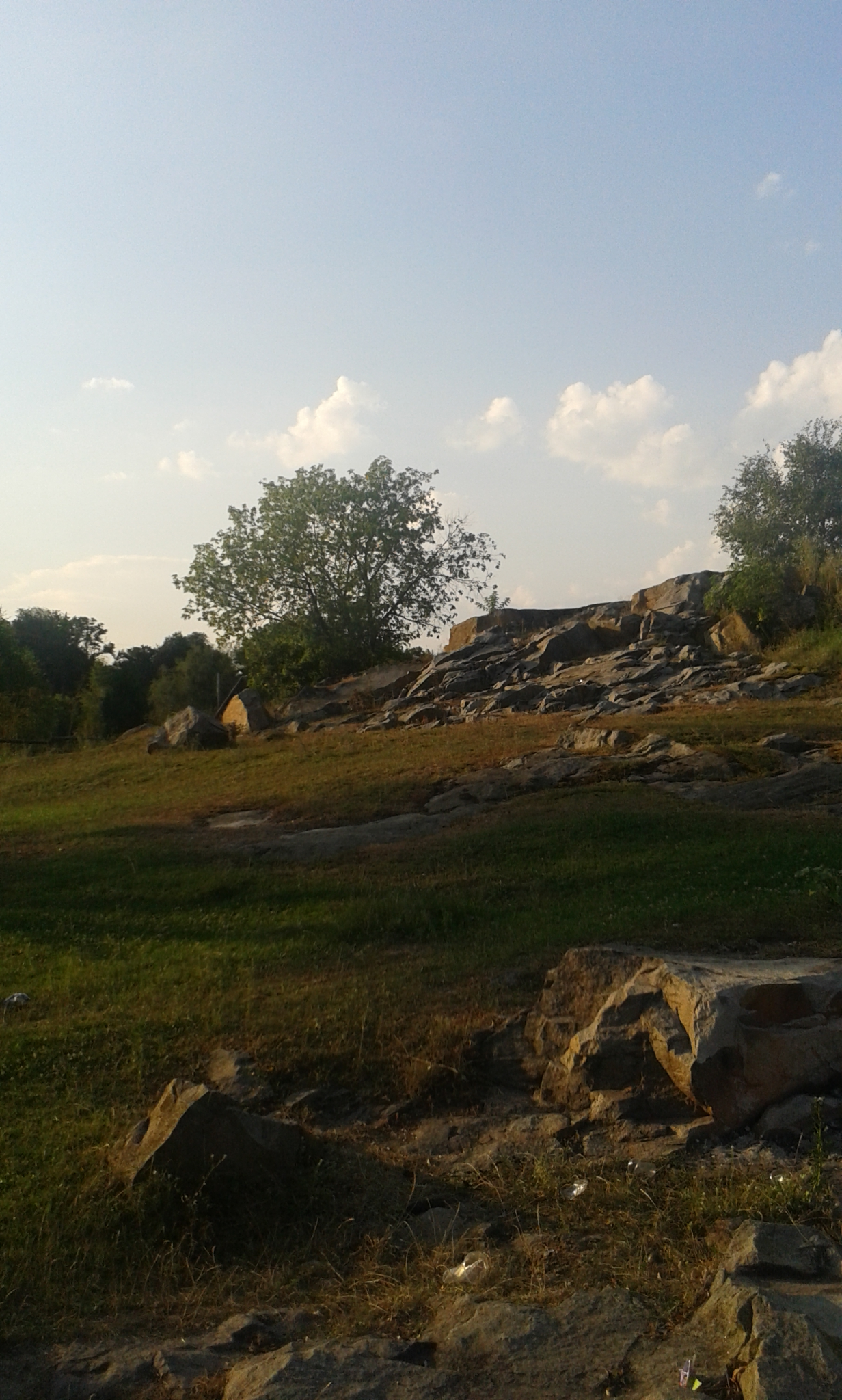 село Городське